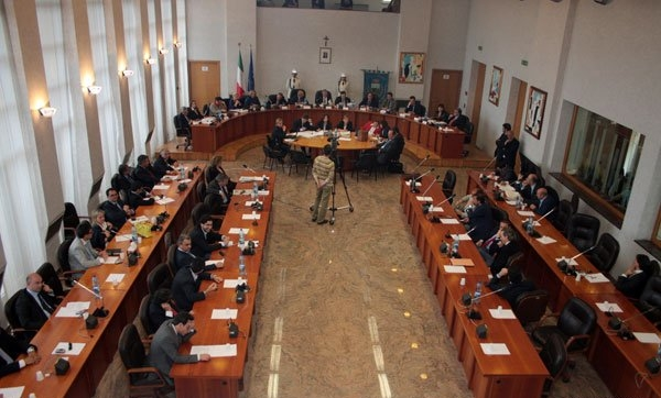 Consiglio comunale di Cosenza